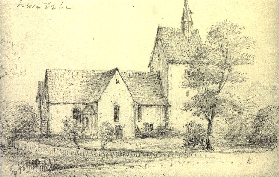 Zitiert aus der Bildbeschreibung des unten genannten Buchs: Kirche in Hillentrup, Nordseite (abgebrochen 1899). Die Skizze von 1898 zeigt u.a. das Nordquerhaus mit einer Nebenapsis (WV 432).